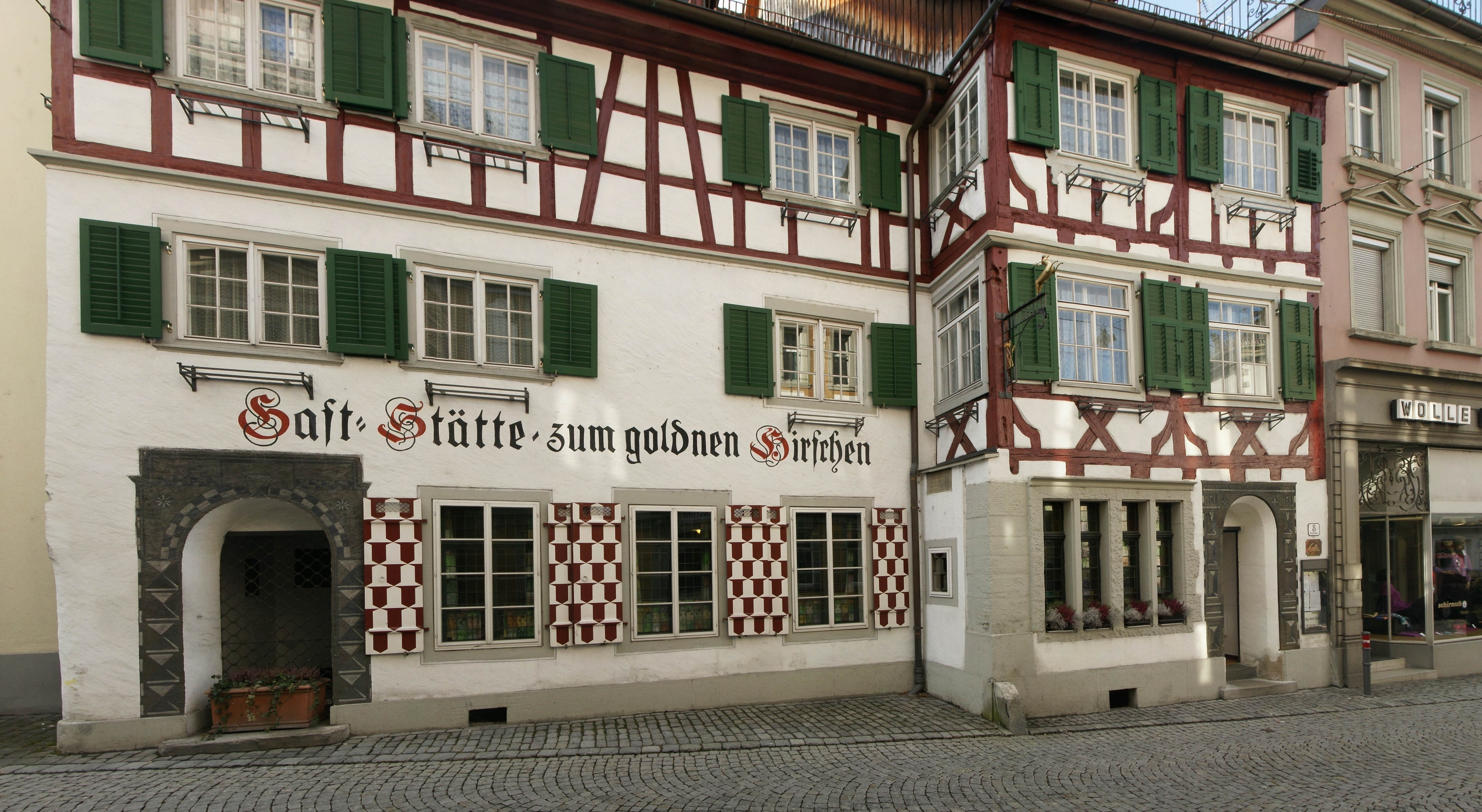 aus dem DEHIO Vorarlberg 1983: Maurachgasse Nr. 8: Kern 16./17. Jh. erweitert 1831, Umbau durch Johann Anton Tscharner 1926. 3geschossig, vor dem Fassadenrücksprung Fachwerk, Sandsteinfassungen der Fenster im Erdgeschoß, Sgraffito-Portalrahmung in Renaissanceformen. Nationalromantische Innengestaltung. Wirtshausschild. *** in Bregenz, Vorarlberg.